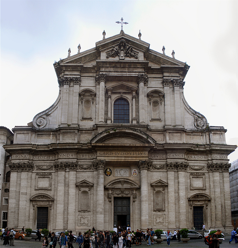 Sant'Ignazio, Rome